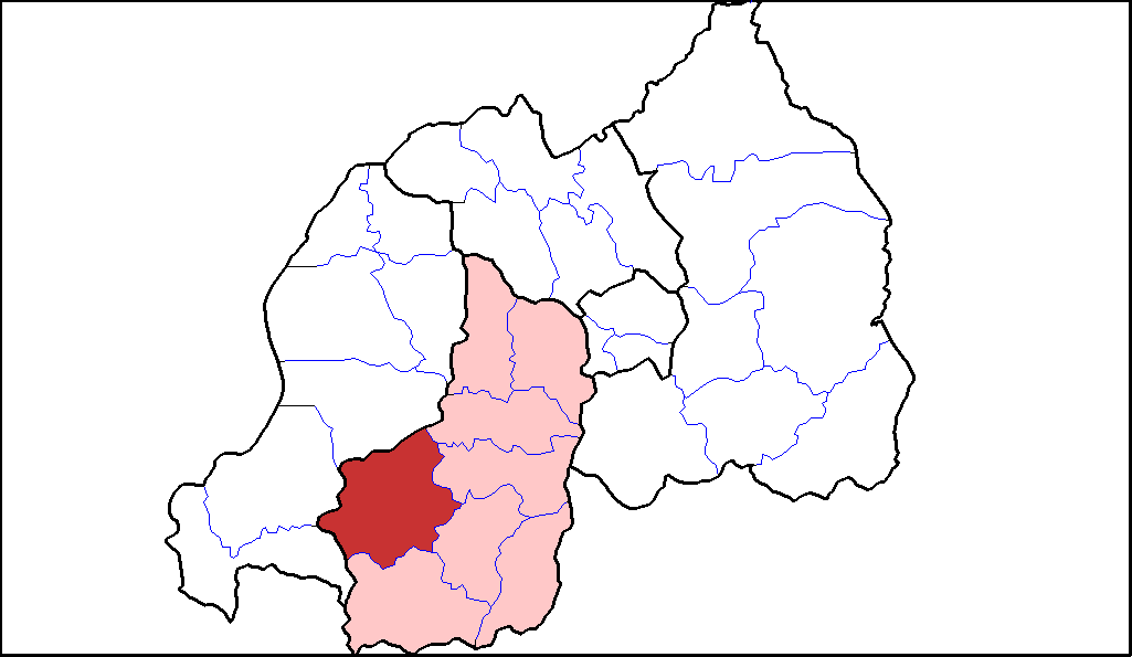 Distretto di Nyamagabe.